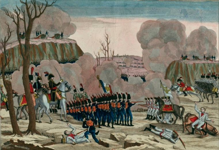 Bataille de Caldiero, gagnée par le maréchal Masséna, général en chef de l'armée française en Italie, sur le Prince Charles, 25 octobre 1805.